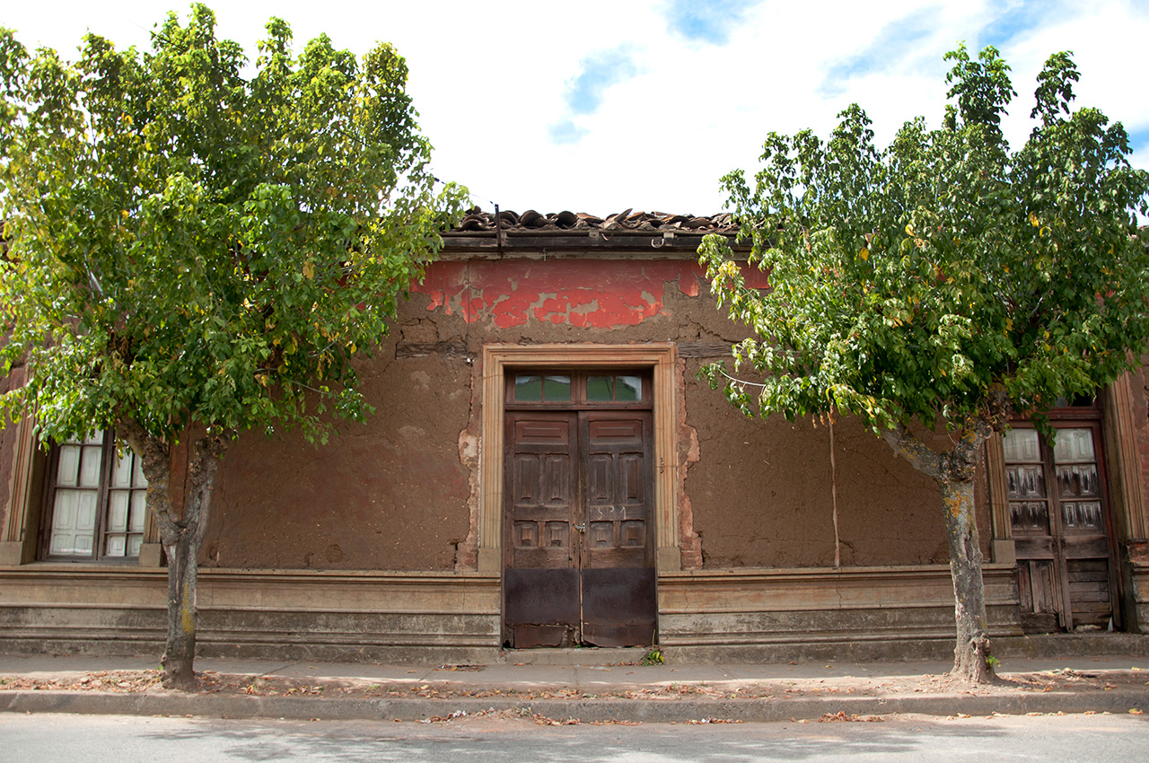 Casa donde nació Violeta Parra This is a photo of a national monument in Chile: 658